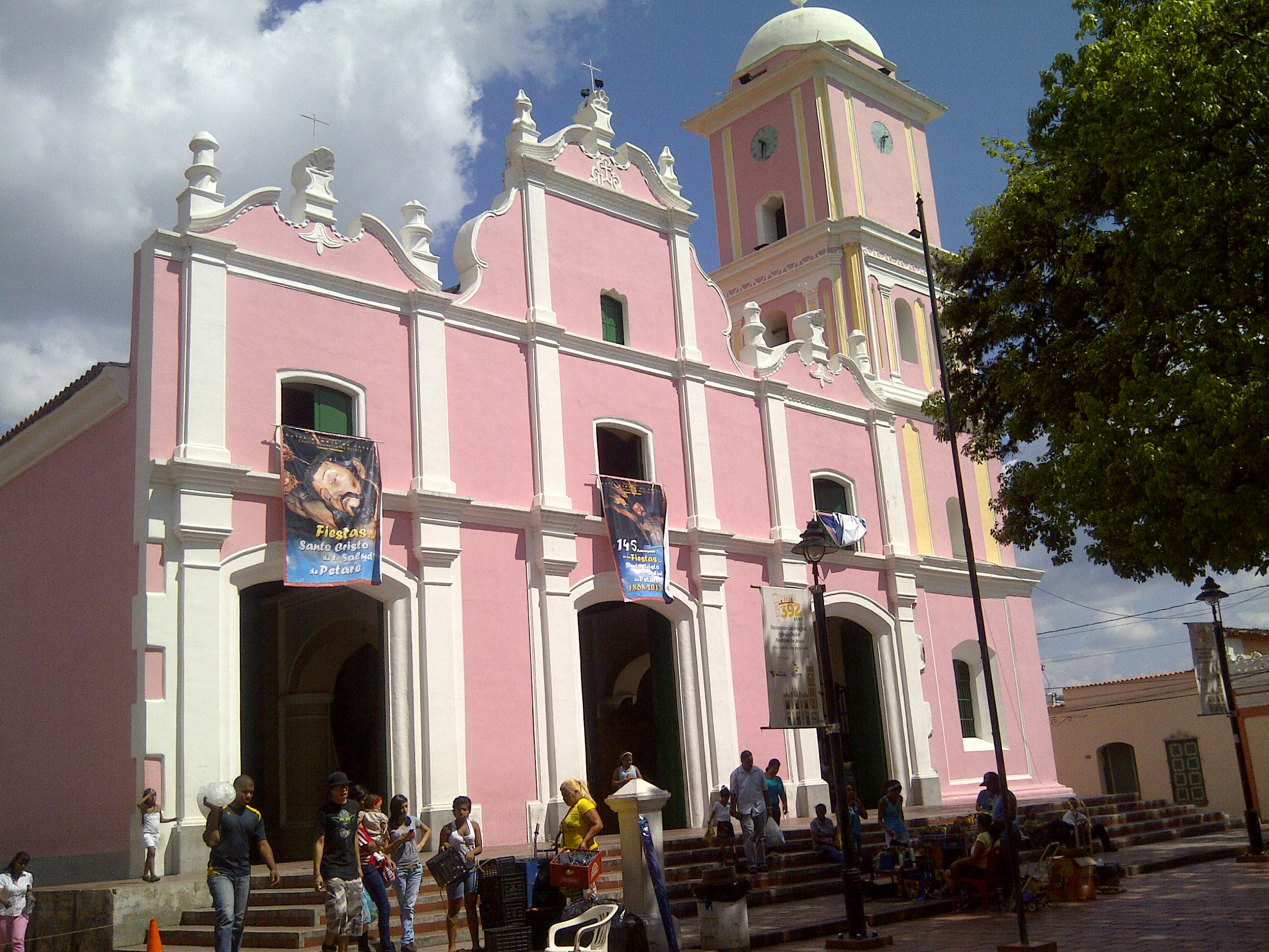 Iglesia Parroquial Dulce Nombre De Jesús, Petare Municipio Sucre, Caracas Estado Miranda Venezuela.